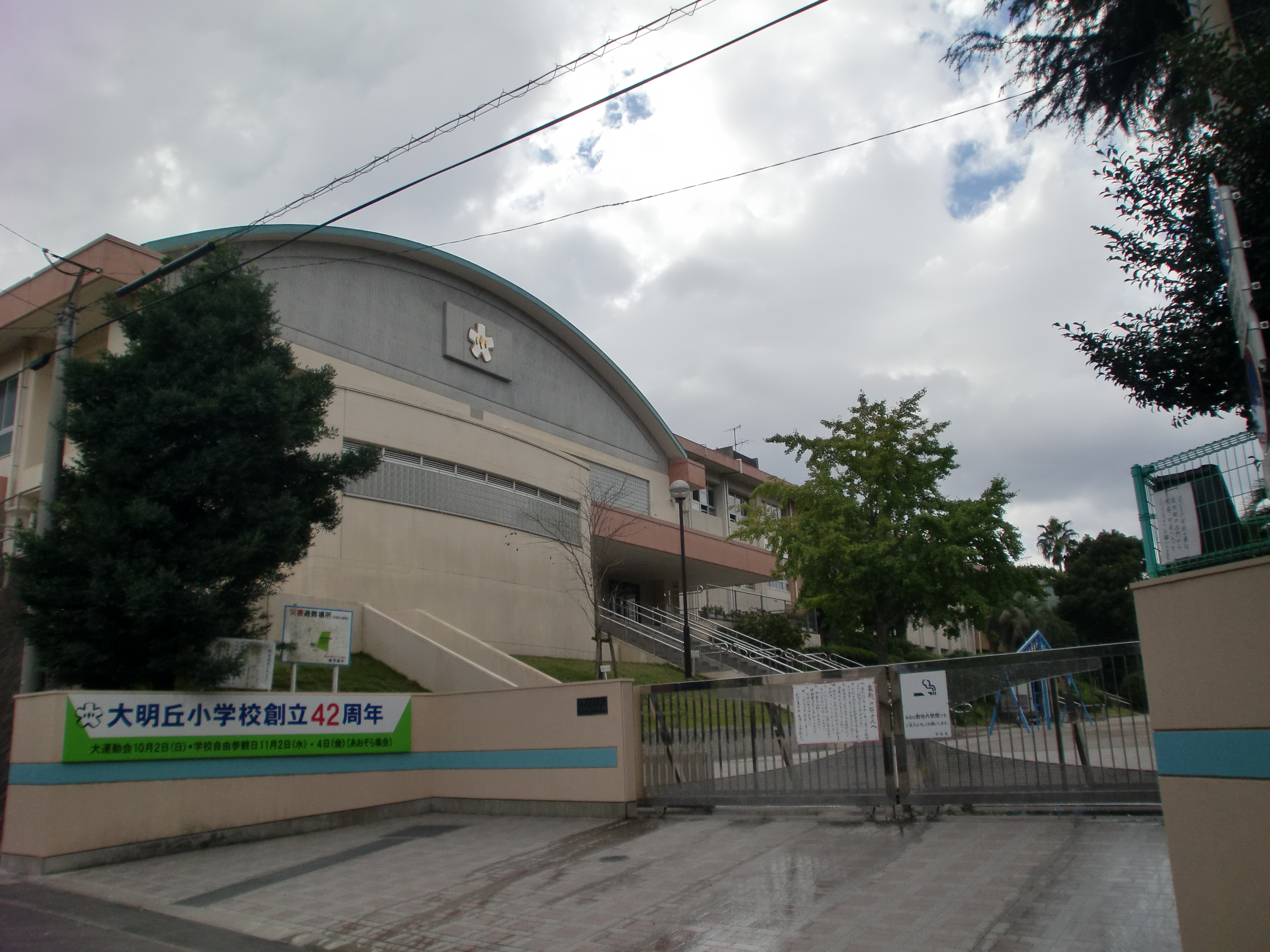 鹿児島市立大明丘小学校の外観。